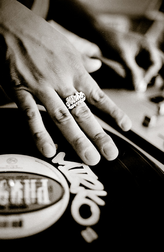 Dj Mirko Machine cuttin with style